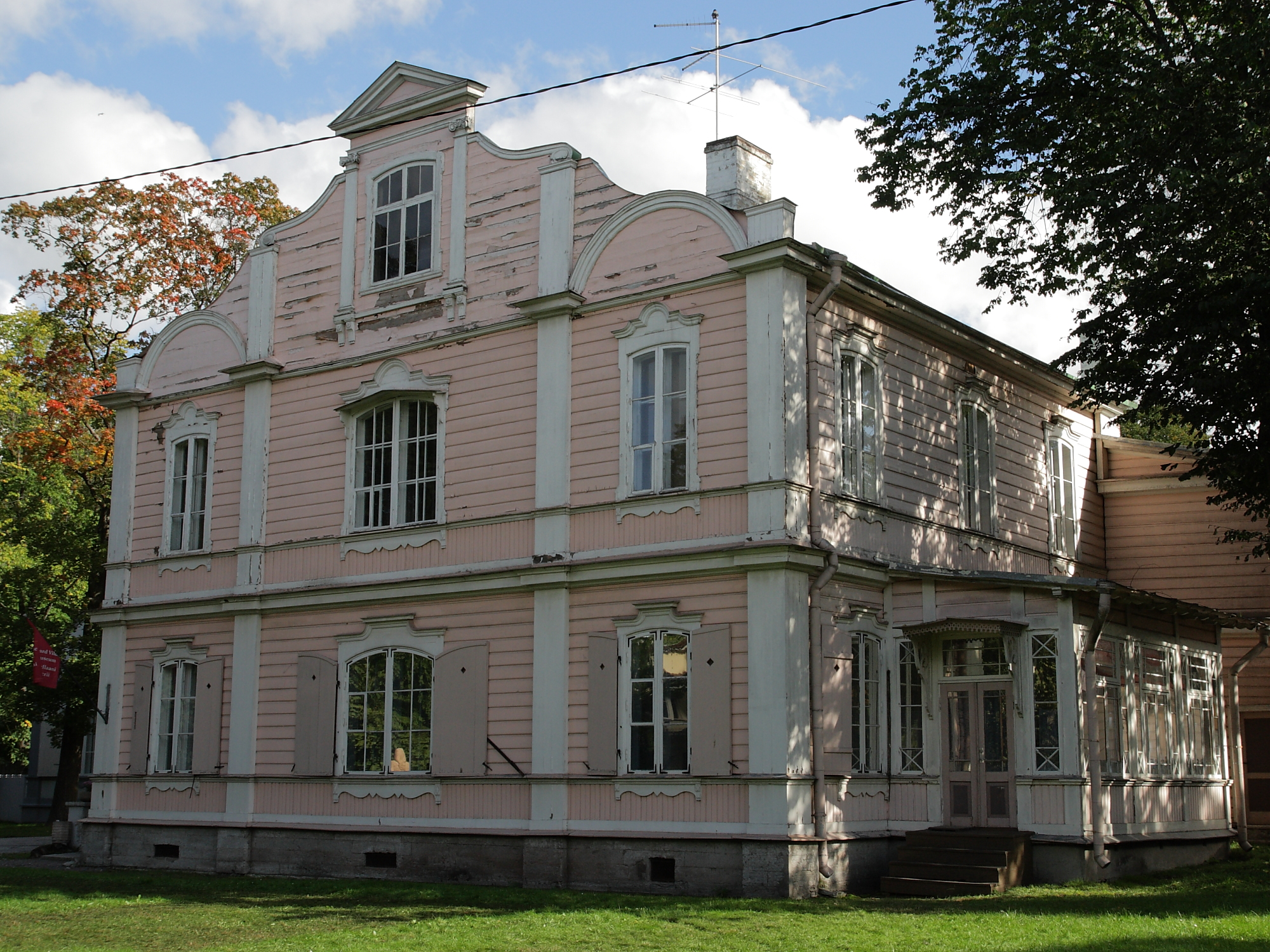 Tallinn, maja, kus aastail 1927-1933 elas Eduard Vilde